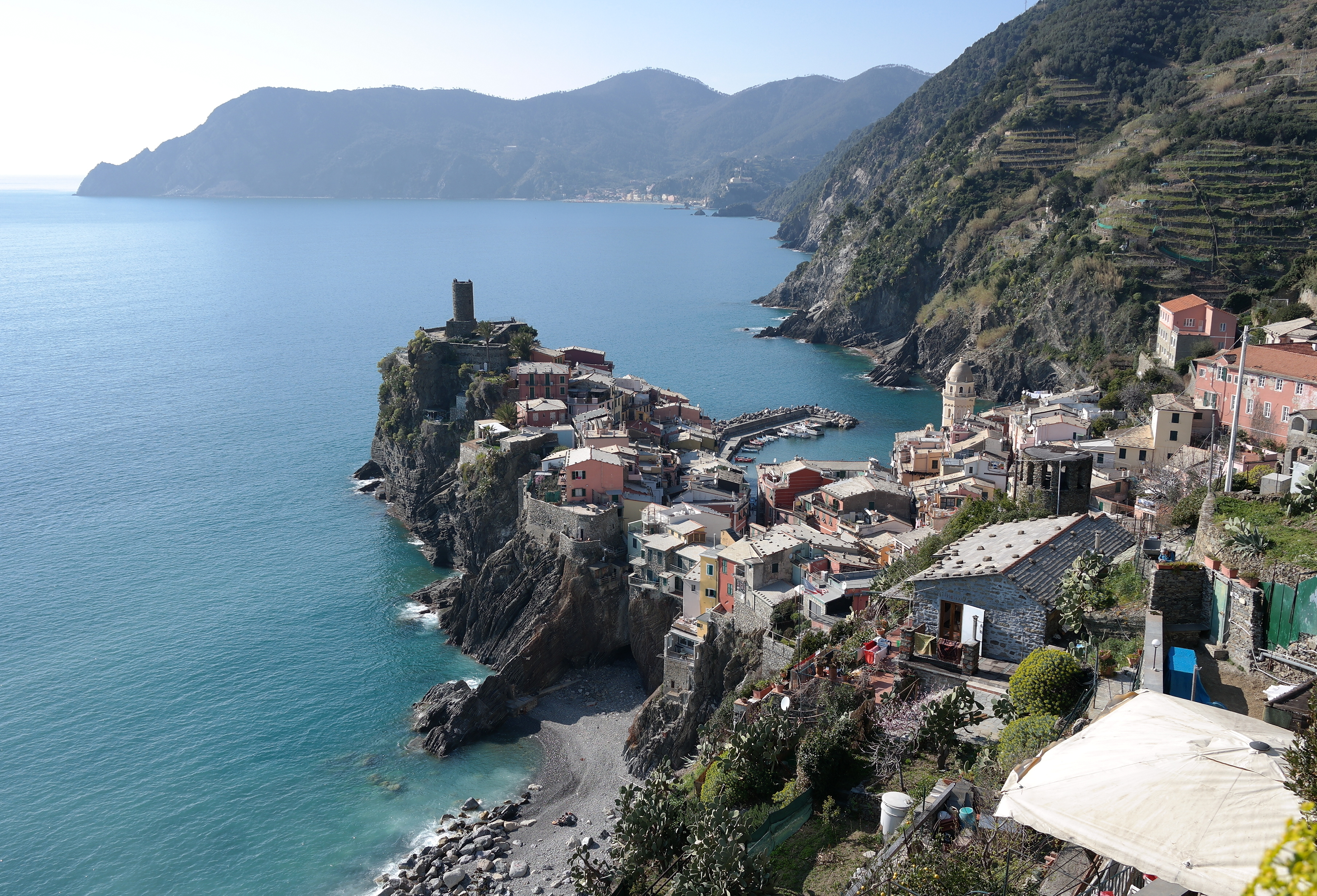 Veduta di Vernazza, nelle Cinque terre